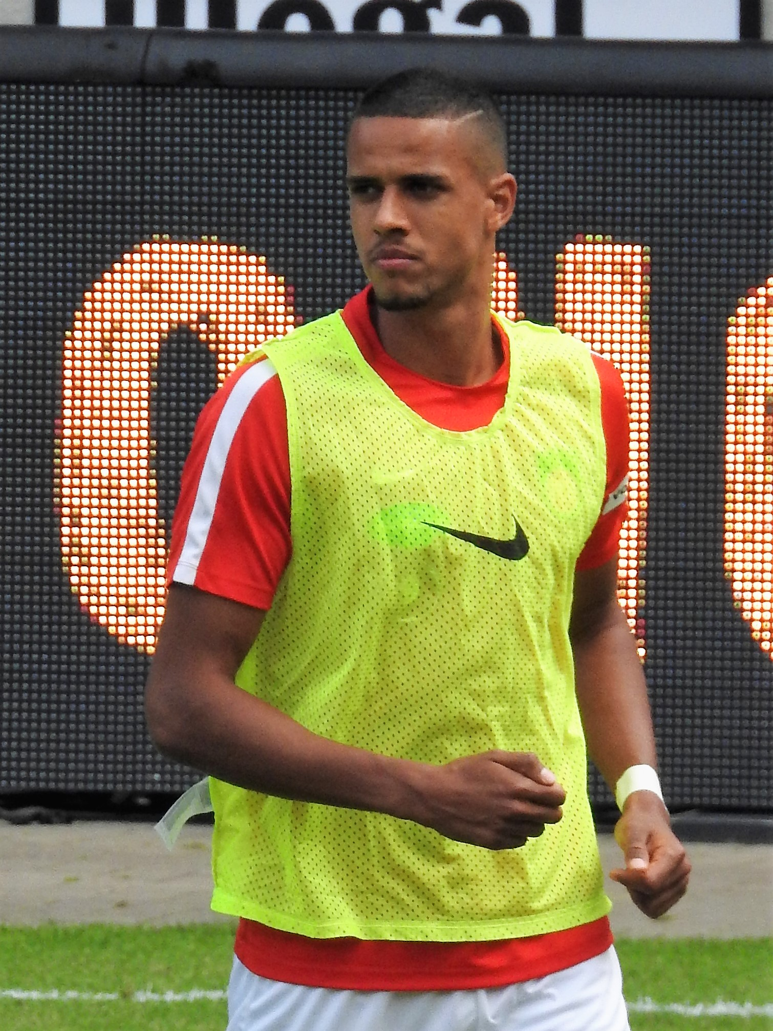 Robert Glatzel Heidenheim